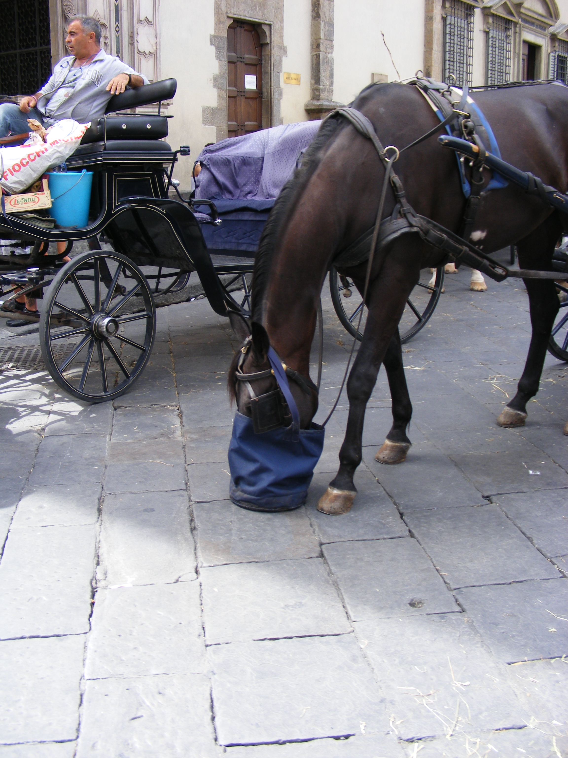 Pferde-Fresssack, gesehen in Florenz